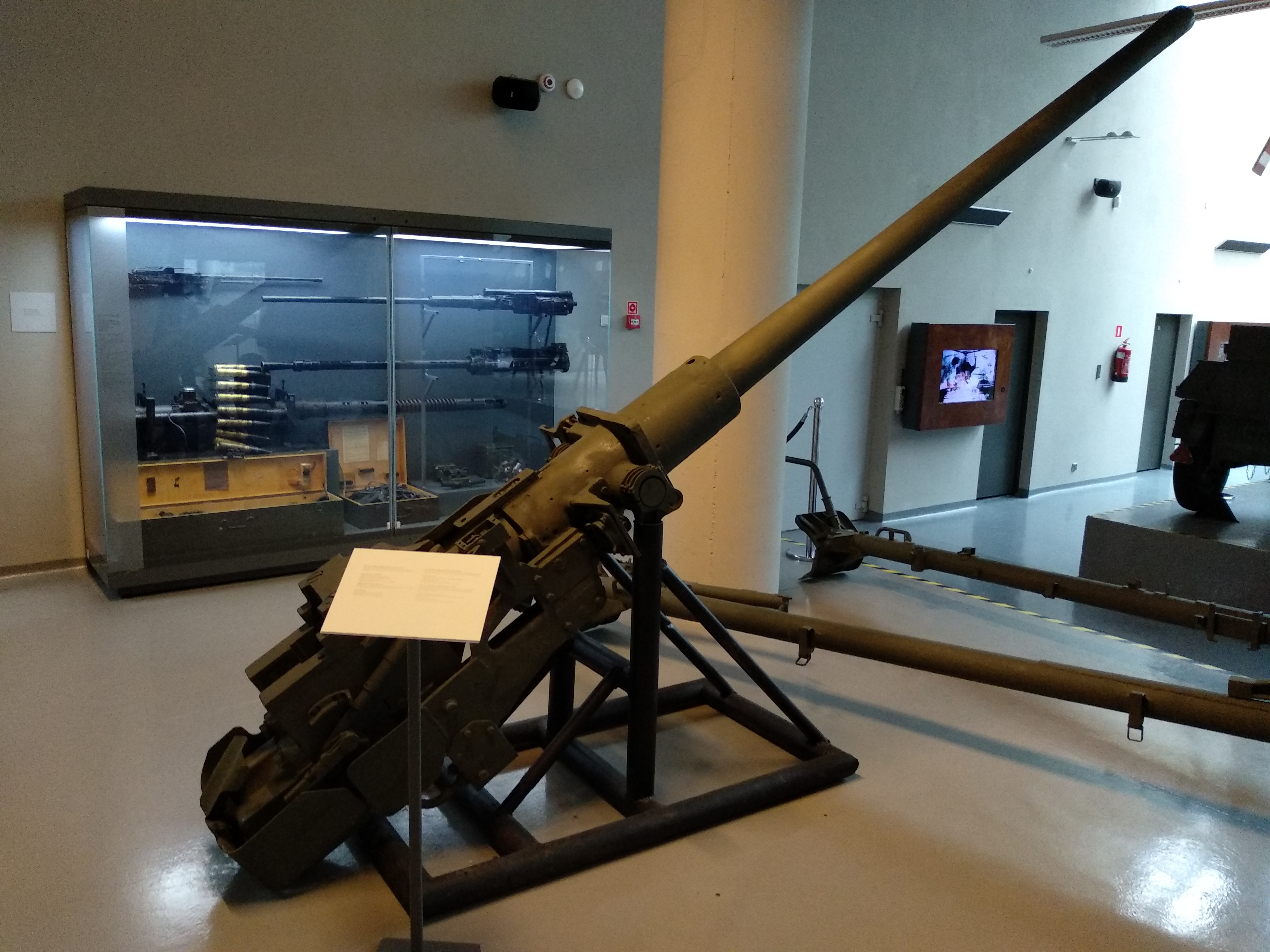 Armata czołgowa ZiS S-53 kal. 85 mm wz. 1944, montowana w czołgach T-34/85, eksponowana w Muzeum Fortyfikacji i Broni "Arsenał" w Zamościu.